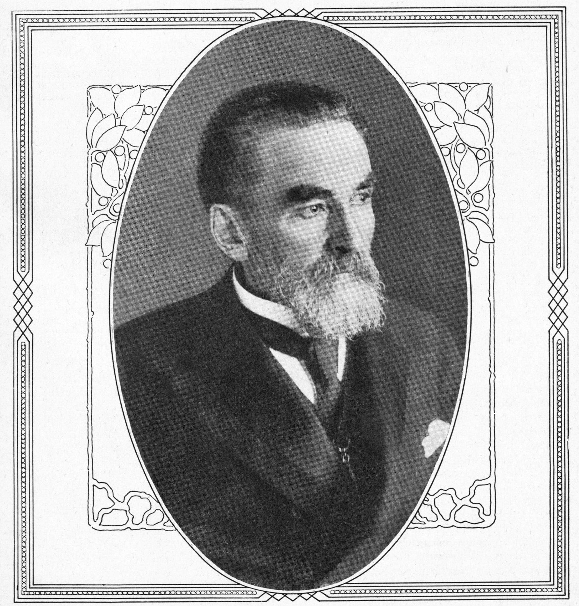 Per Johan Wising (1842-1912) på omslaget till Hvar 8 Dag 1912.